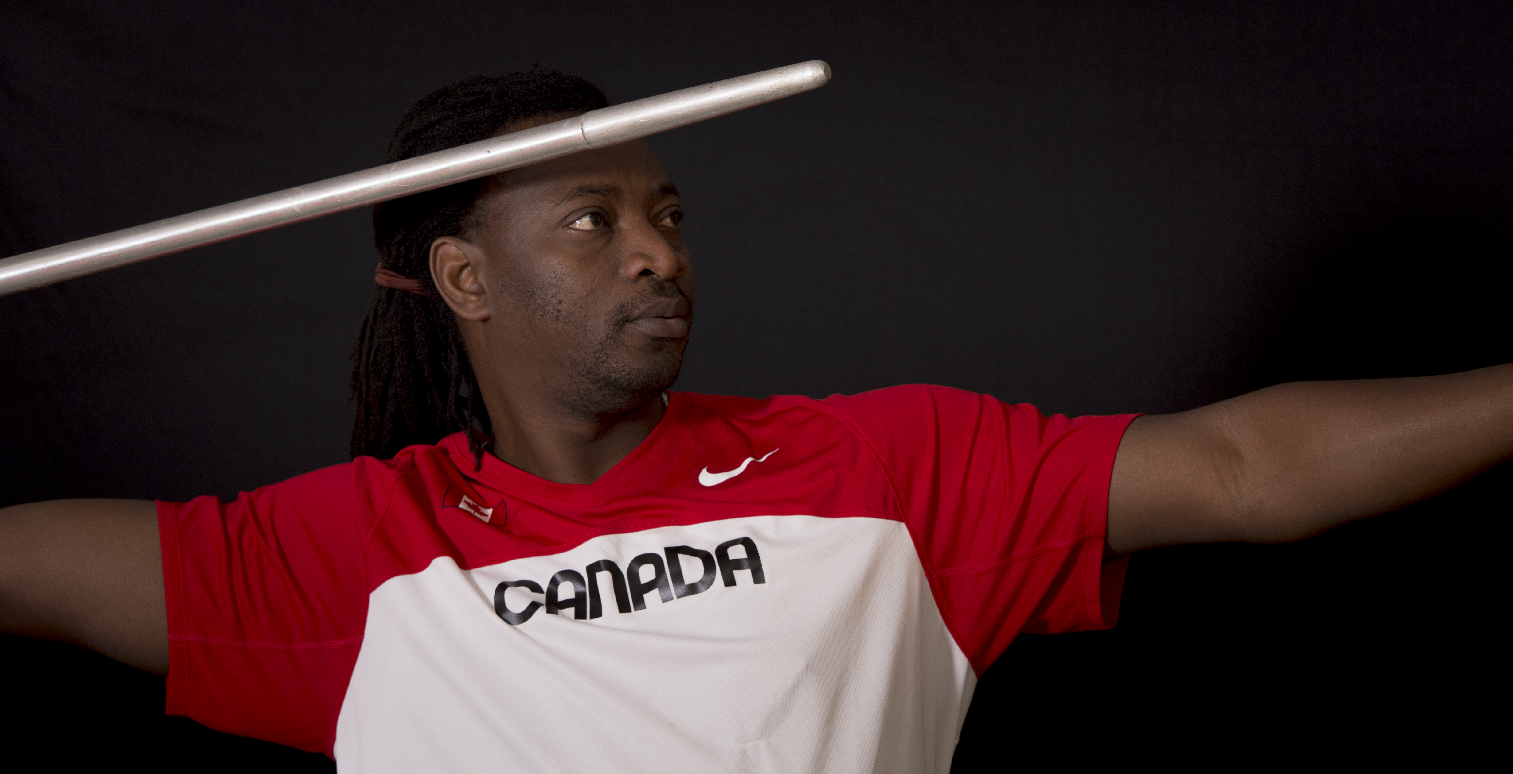 Javelot Gold